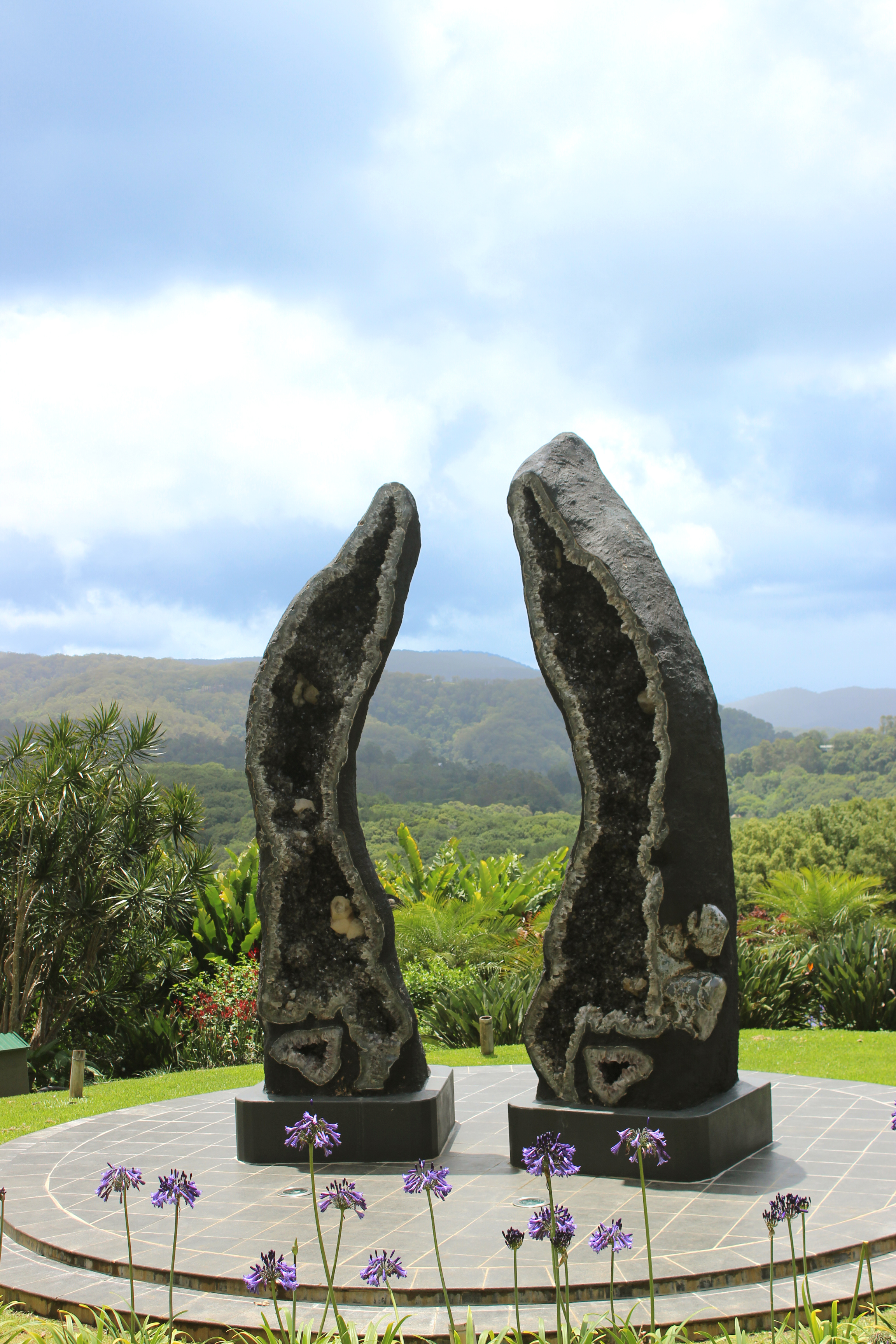 Die zwei größten Kristalle der Welt